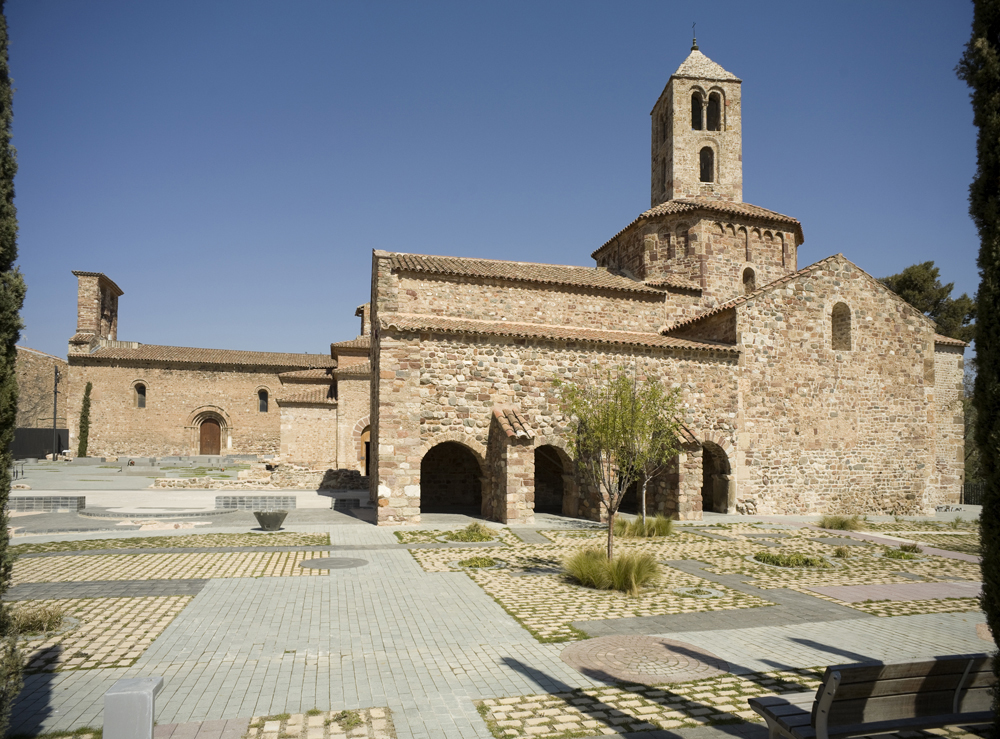 Cultural Heritage Spain